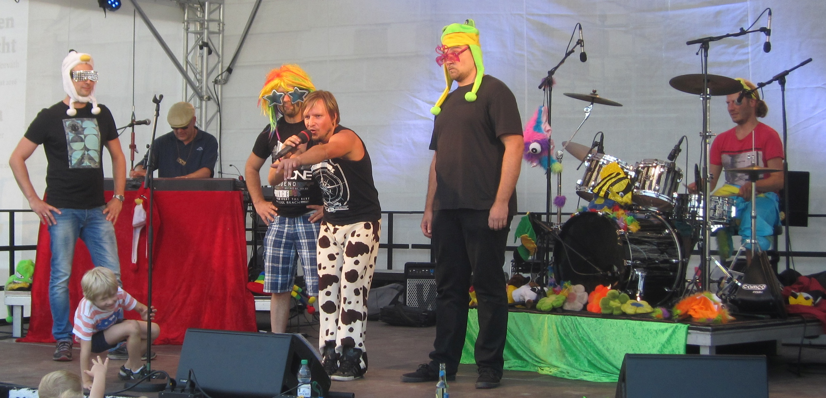 Maxim Wartenberg und sein Trommelfloh auf der Bühne am Palais im Großen Garten (Dresden) zur Saisoneröffnung des Staatsschauspiels Dresden